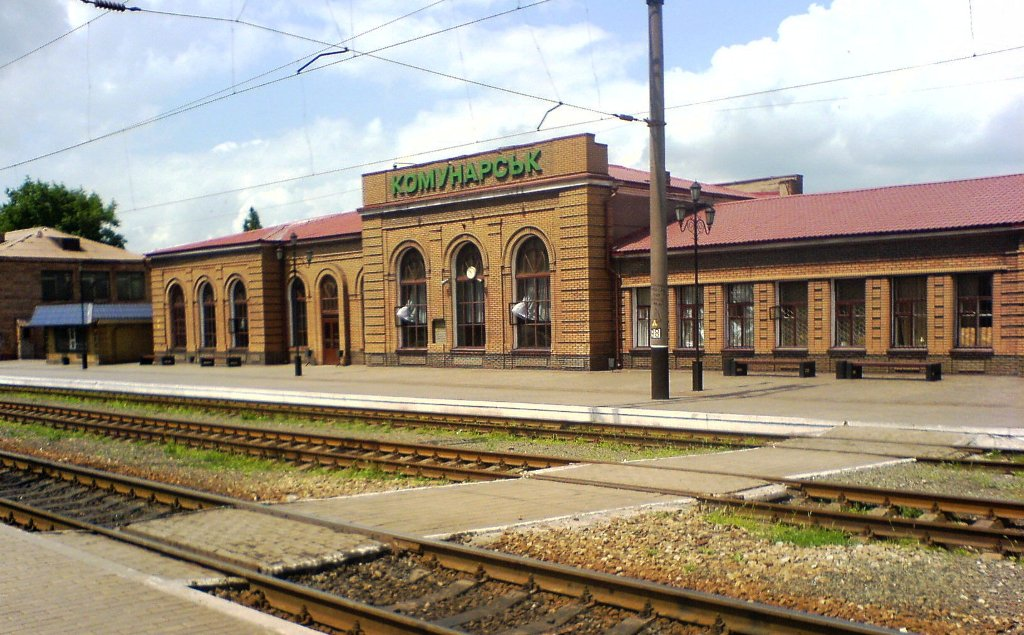 Будівля залізничного вокзалу, Алчевськ, вул. Заводська, 27